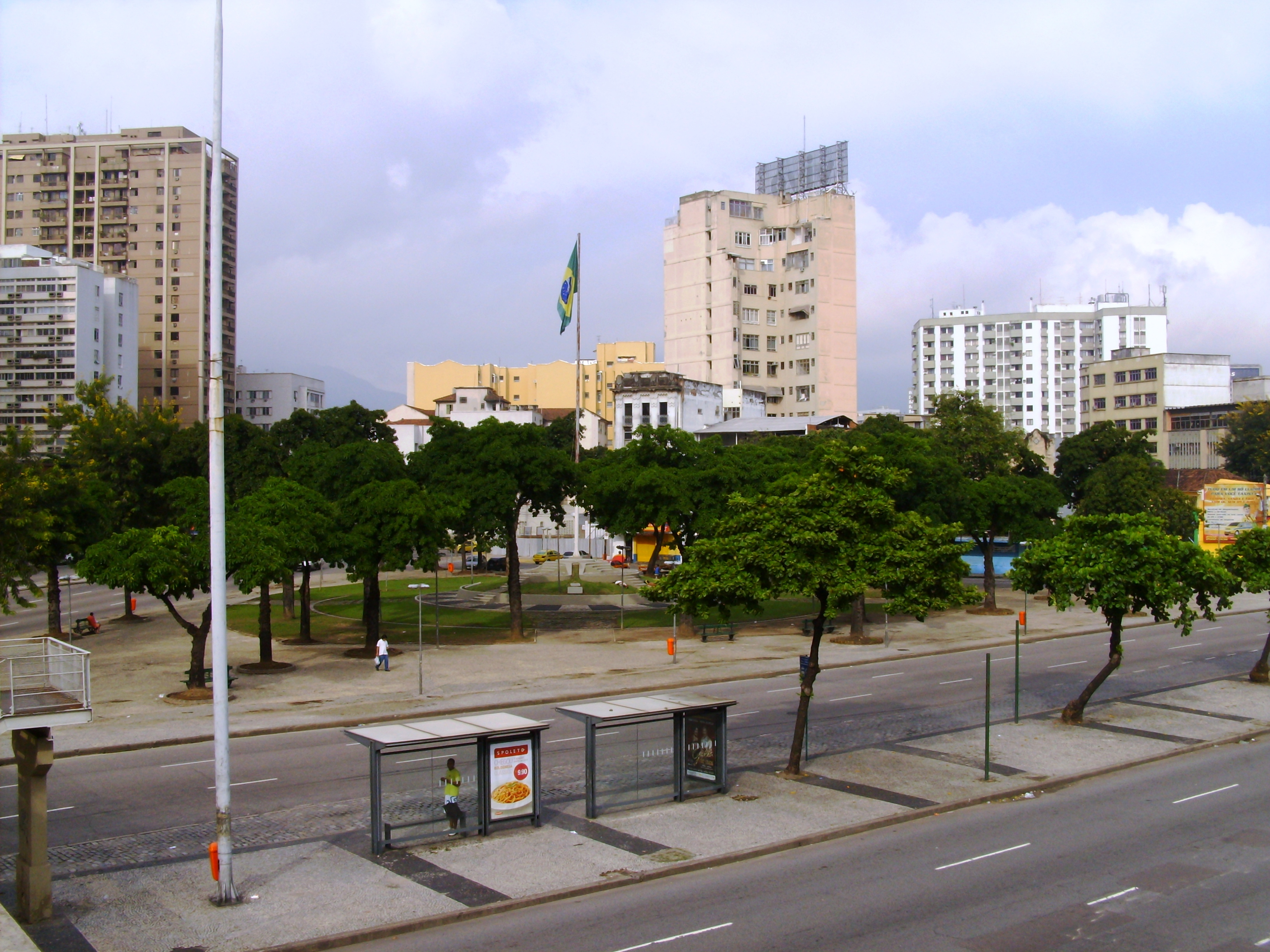 Praça da Bandeira, Rio de Janeiro, RJ, Brasil: Vista panorâmica.